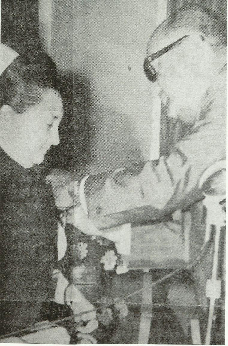 La enfermera Aurora López Pérez recibe una condecoración por sus actividades gremiales, de manos del Gobernador del Estado Zulia Elio Suárez Romero. Fotografía tomada del original de la edición del diario Panorama de Maracaibo, del 20 de septiembre de 1971.